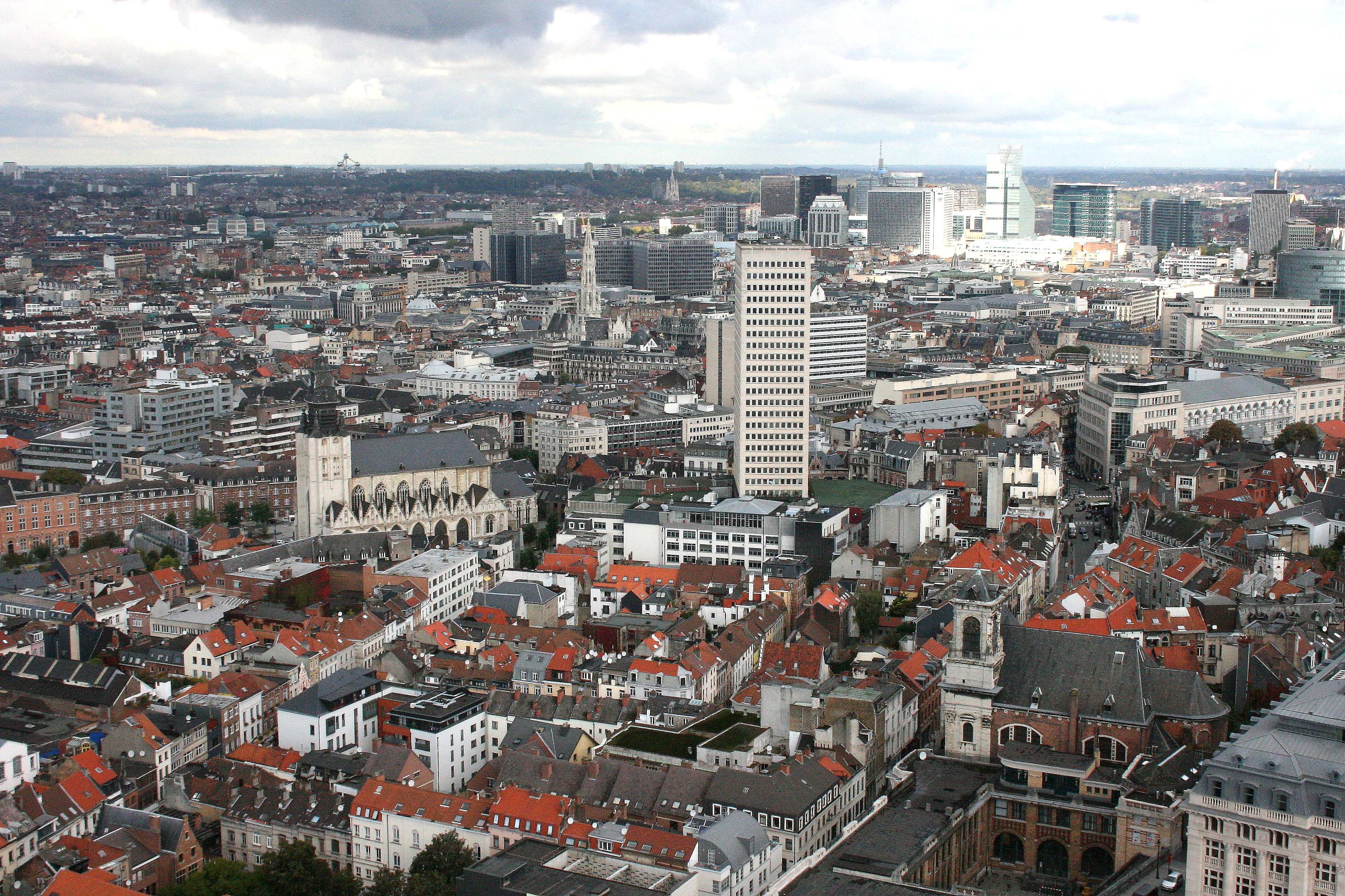 Vue du Nord de Bruxelles depuis la coupole du Palais de justice